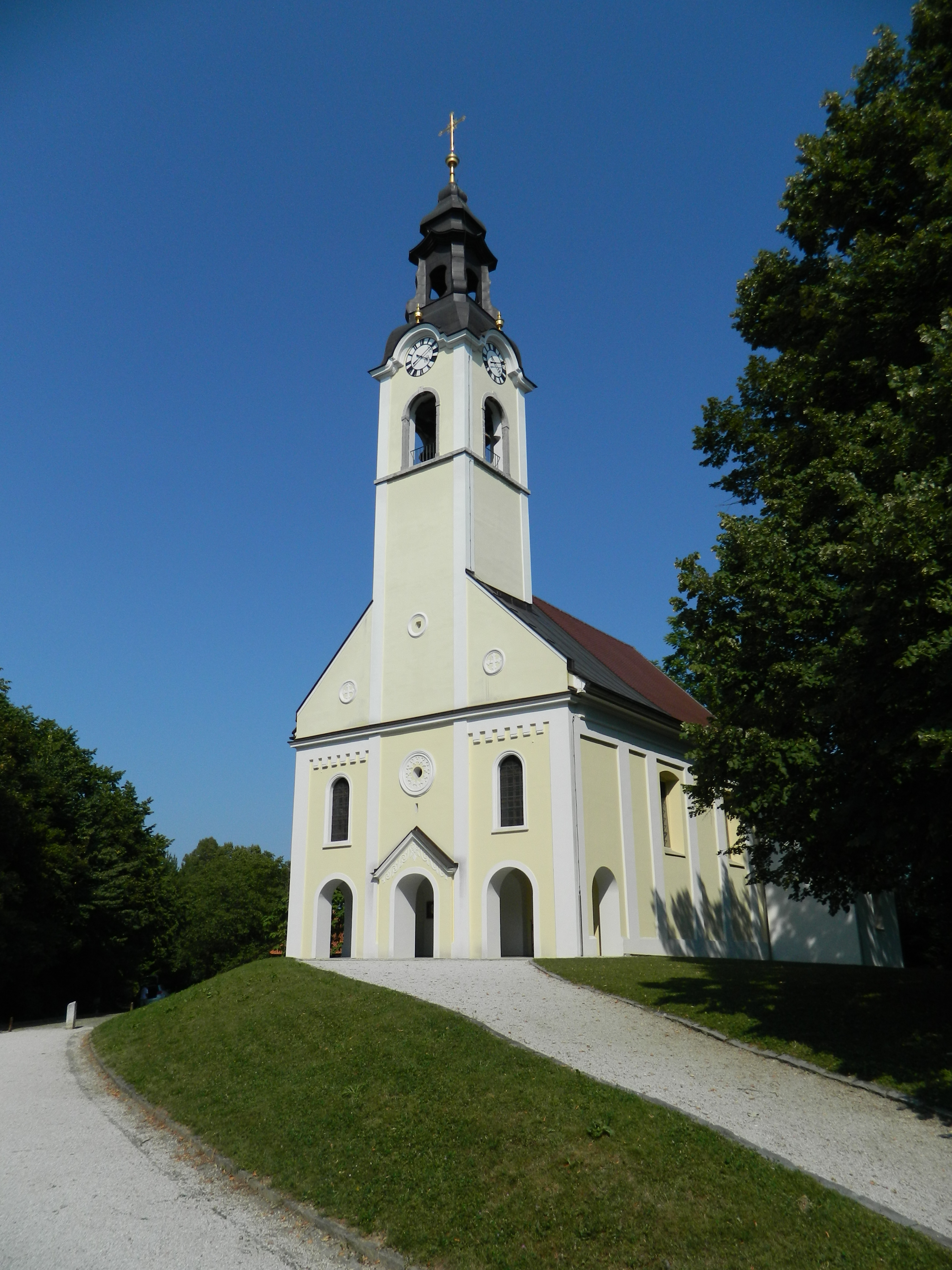 Cerkev Svetega Urha po obnovi fasade.